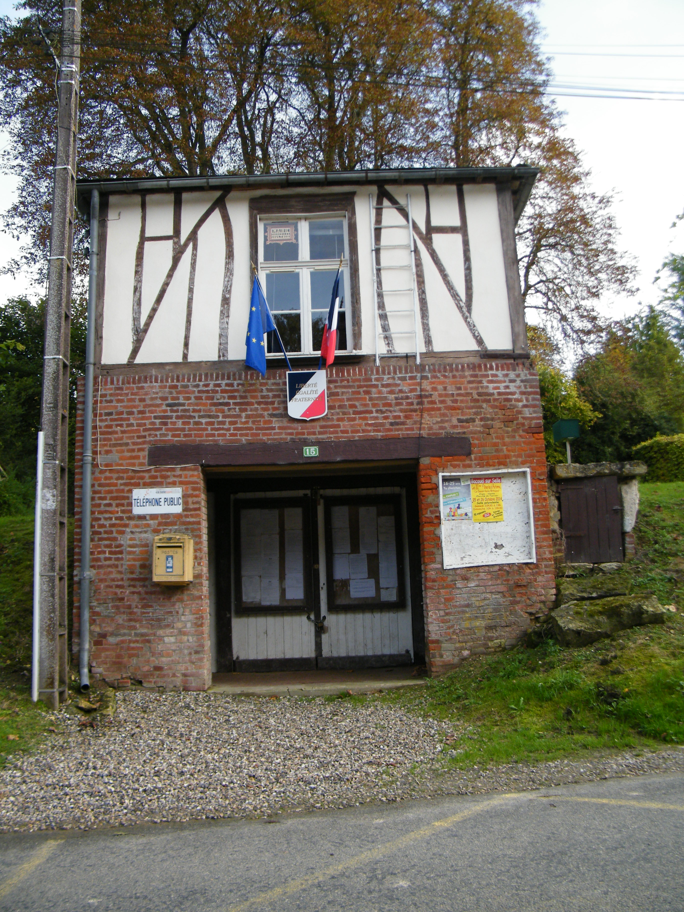 Mairie.